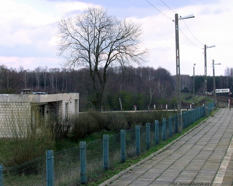 Nurzec Nowy